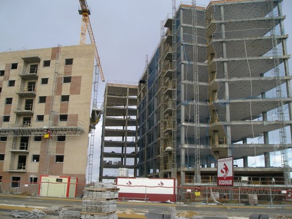 Edificios en construcción